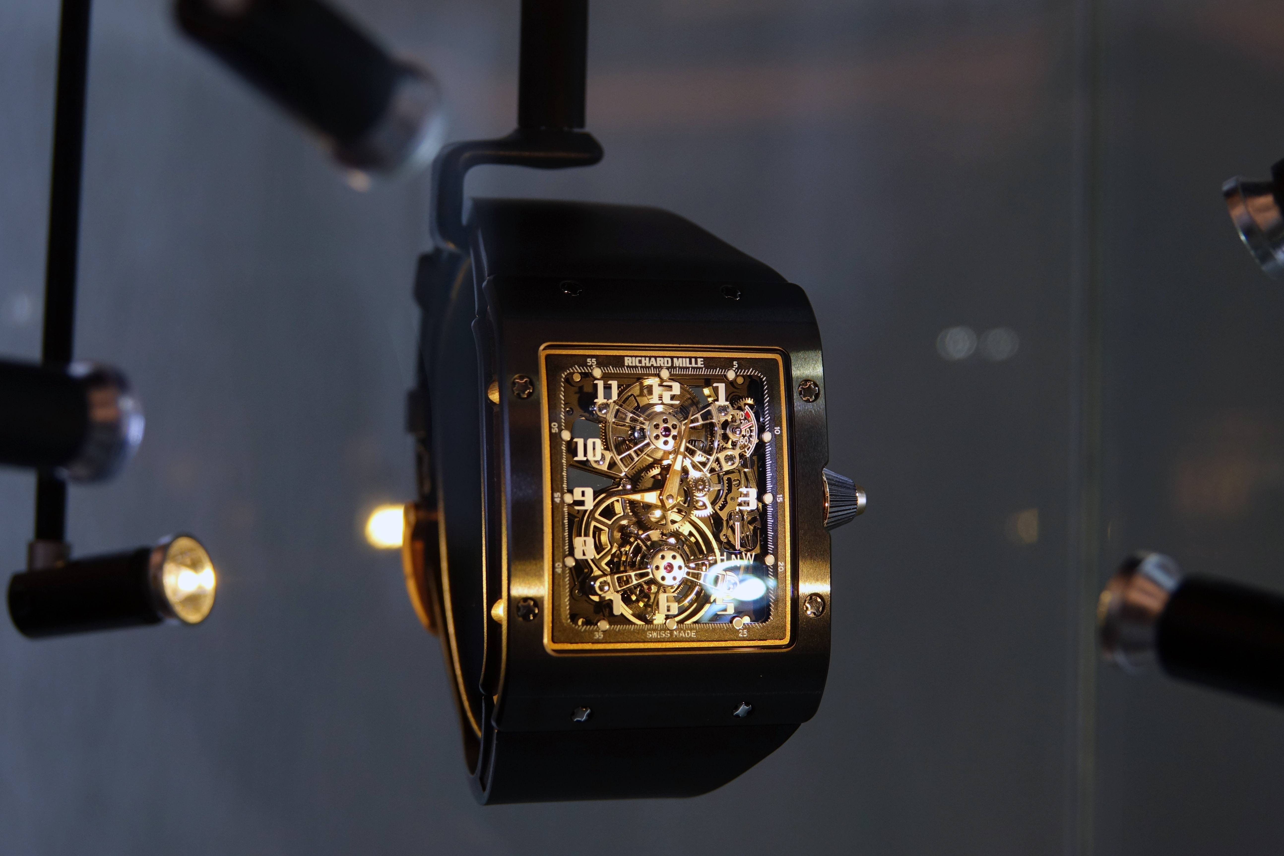 Boutique Richard Mille Paris